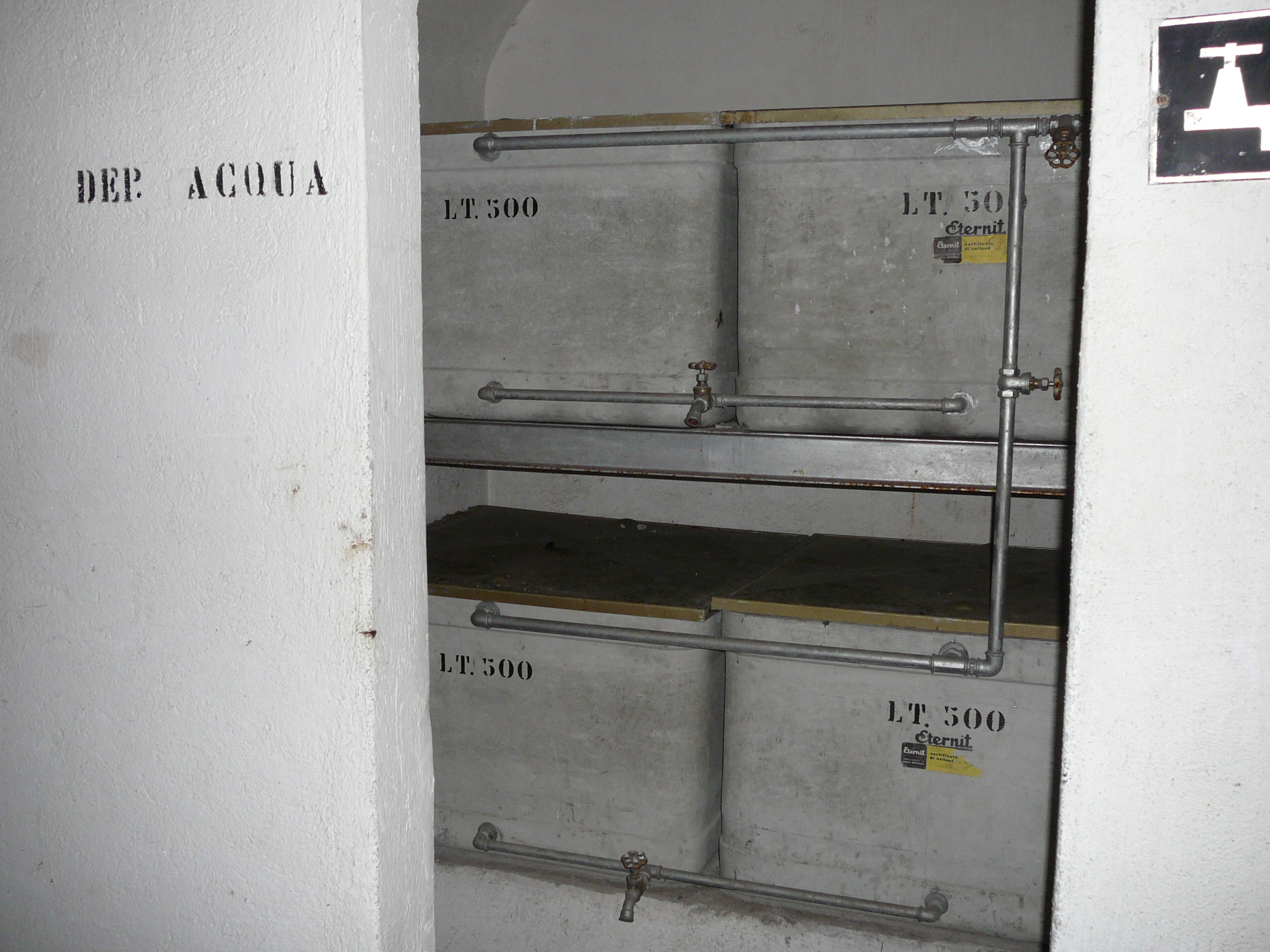 Vasche in eternit per contenere 500 litri di acqua non potabile all'interno delle opere del Vallo Alpino. Qui le vasche dell'opera 2 di Landro Nord